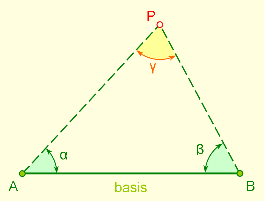 Het principe van de voorwaartse insnijding met variabelen conform de basishoekmethode